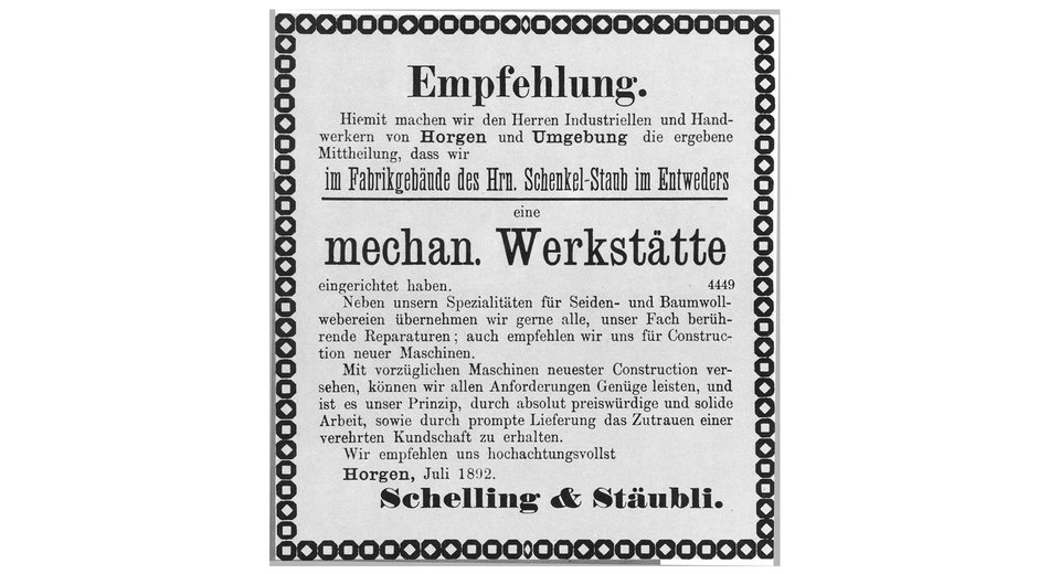 Gebrüder Stäubli, Horgen ZH, Schweiz